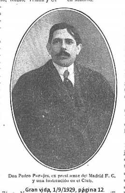 Fotografia di Pedro Parages pubblicata su Gran Vida del 1.9.1929 a pag.12